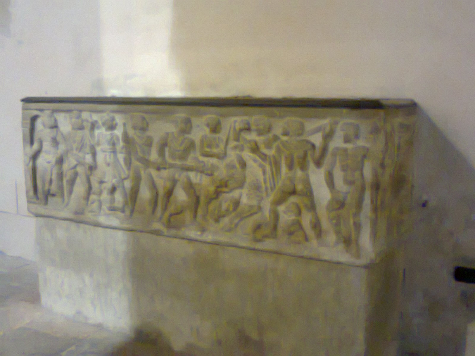 Autore Alfredo Ledonne, foto scattata personalmente l'8 dicembre 2012, voglio che chiunque usi la foto mi riconosca come autore riportando il nome che ho indicato e che mantenga la stessa licenza per le opere derivate.